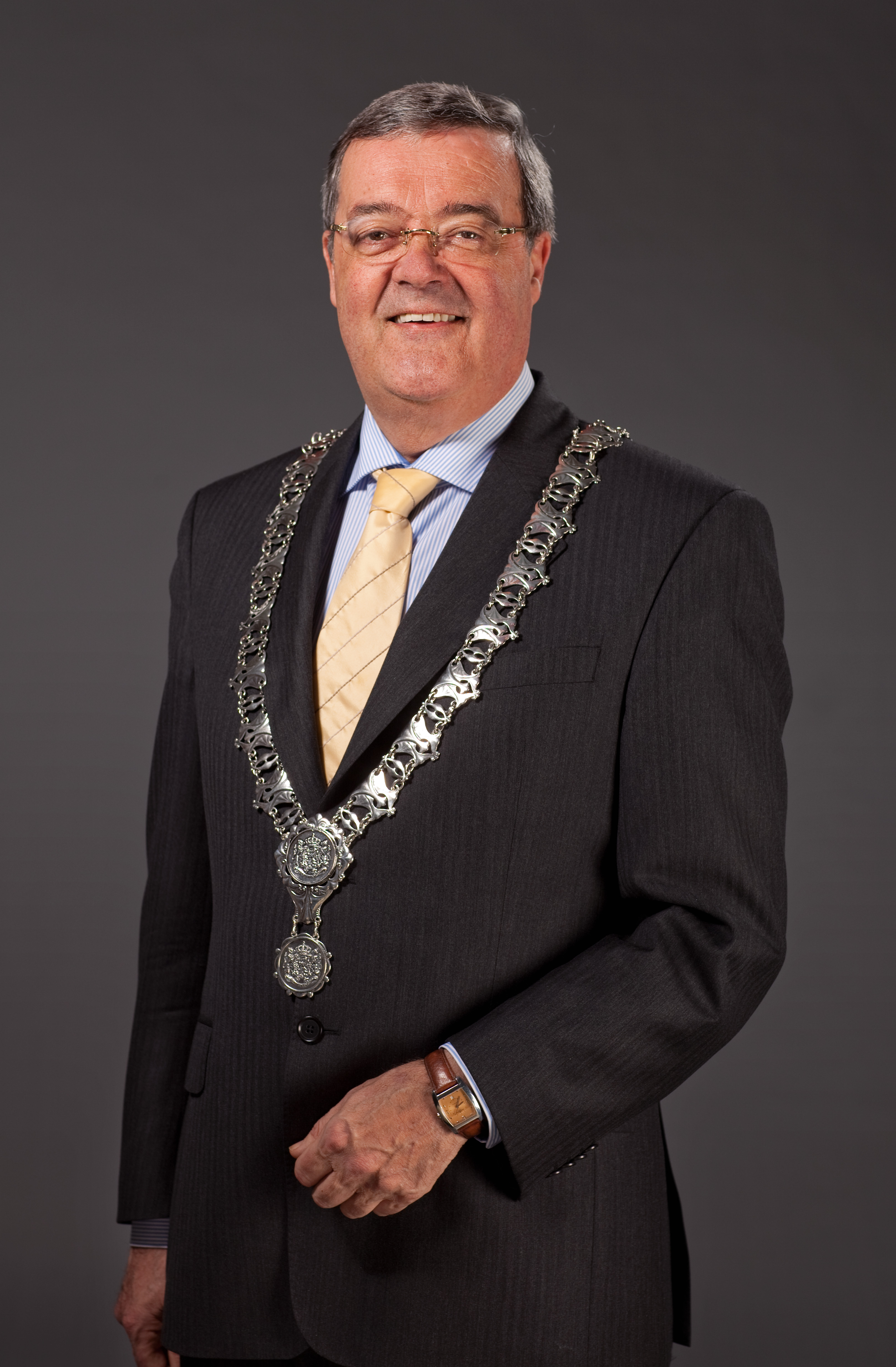 C.J.J. (Coert) van Ee (Jutphaas, 1 mei 1954) is een Nederlandse politicus van het CDA.